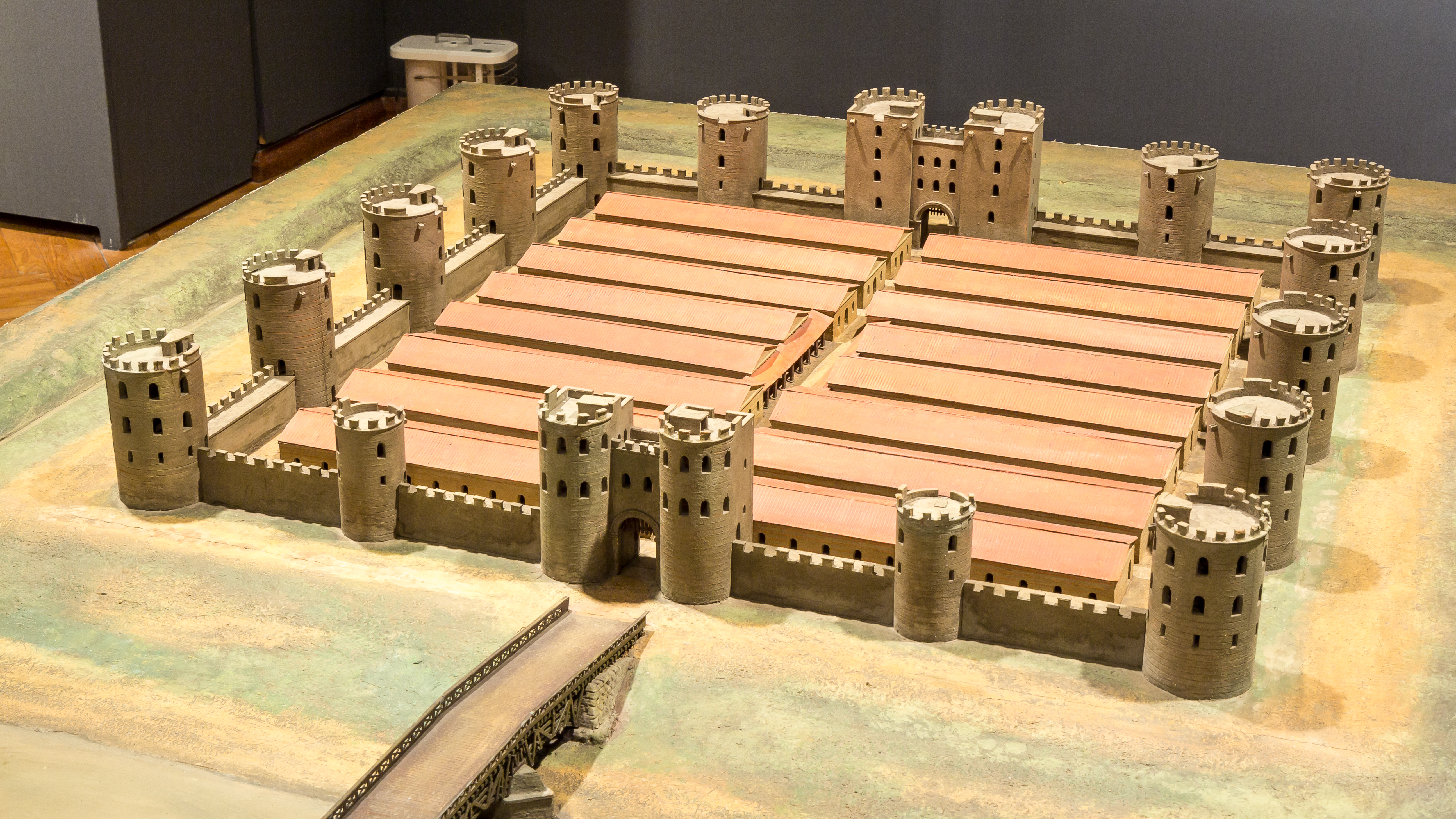 Sonderausstellung im Kölnischen Stadtmuseum: „Drunter und Drüber - Der Heumarkt“ Foto: Modell vom Kastell Deutz